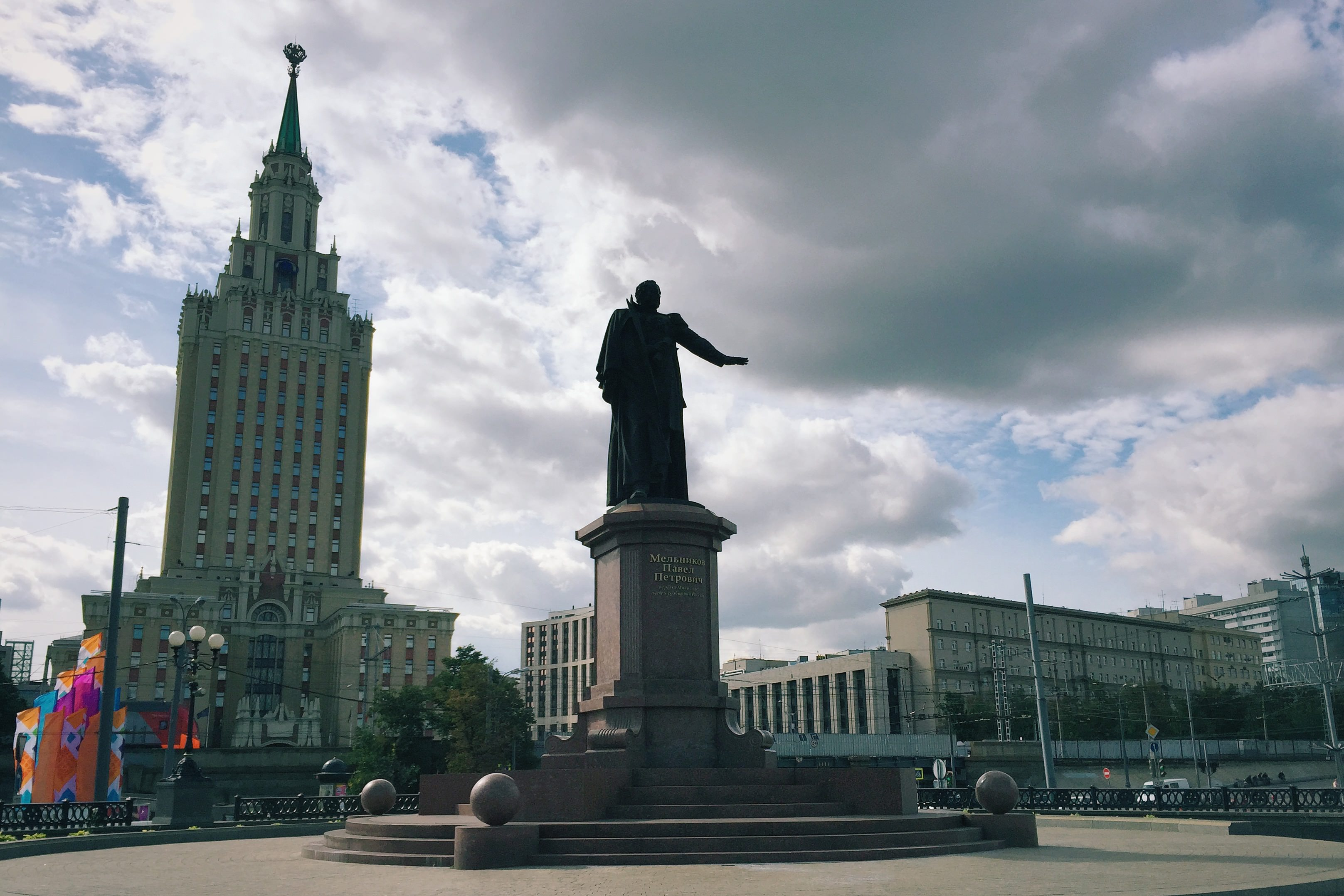 Комсомольская площадь Moscow in 2015; Москва в 2015